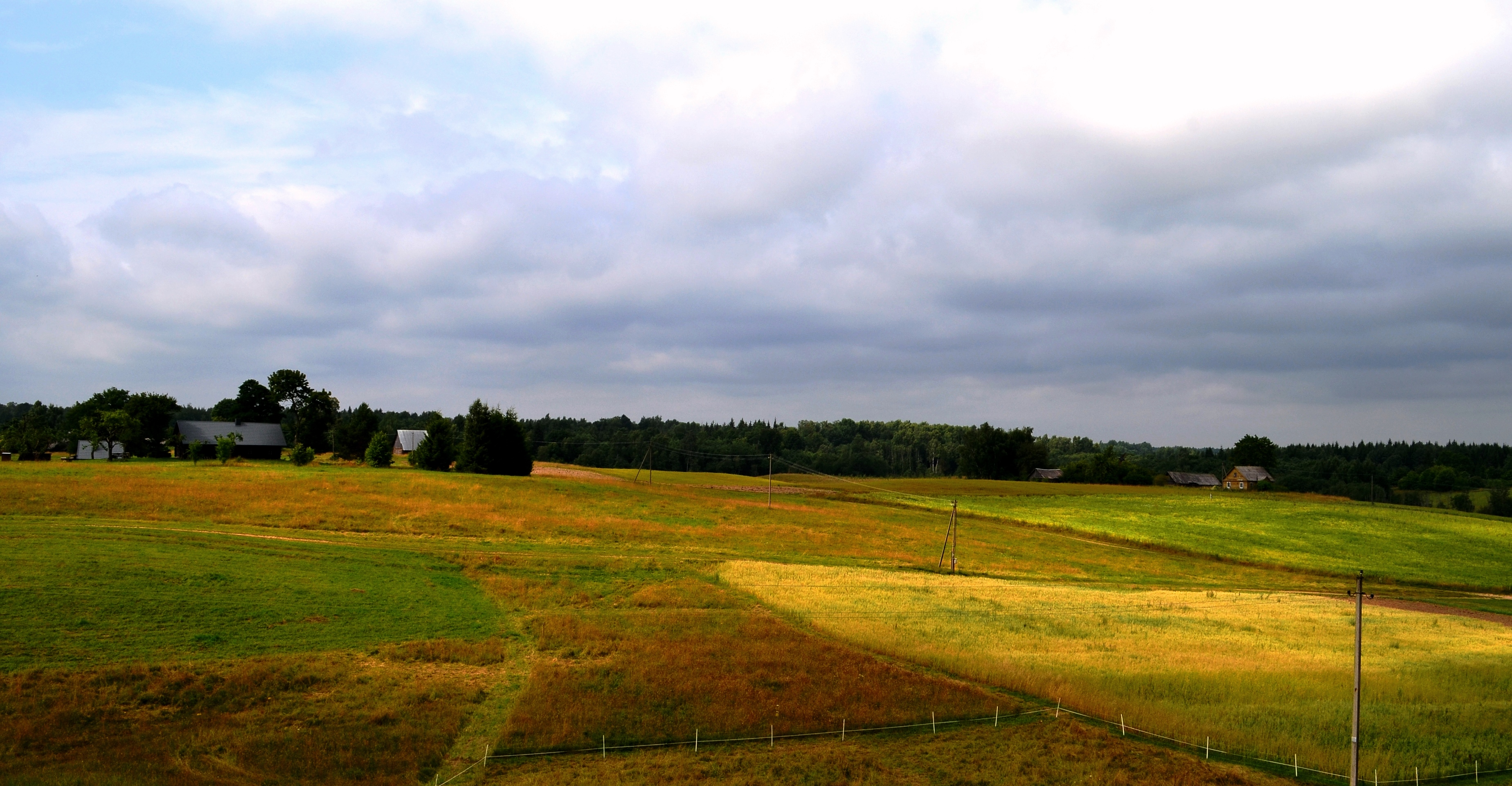 Liesėnai, Molėtų r.